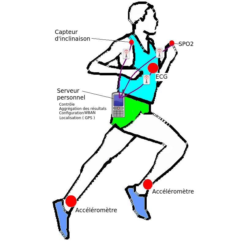 Body Area Network - Réseau de capteurs pour la surveillance des paramètres physiologiques